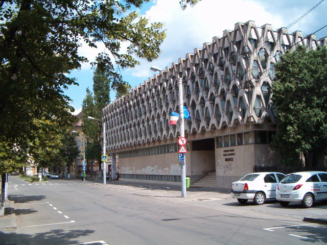 Cluj-Napoca, Arhivele Naţionale ale României (str. M.Kogălniceanu nr.10)